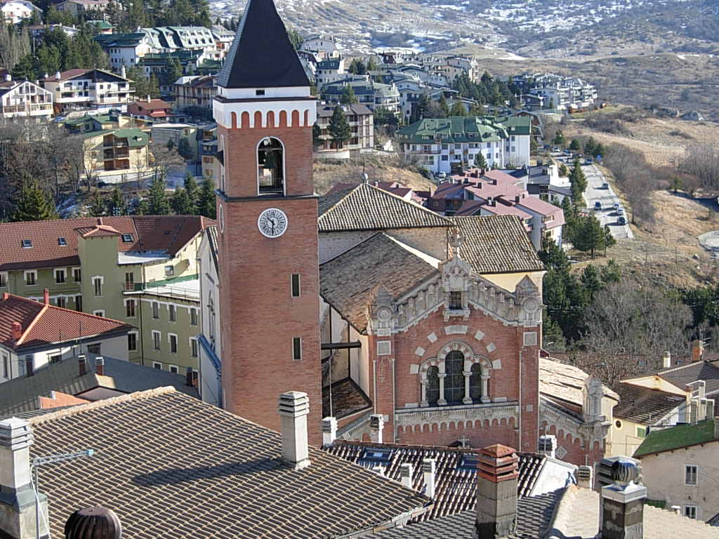 Chiesa parrocchiale di Rivisondoli (AQ) Foto personel concessa in PD